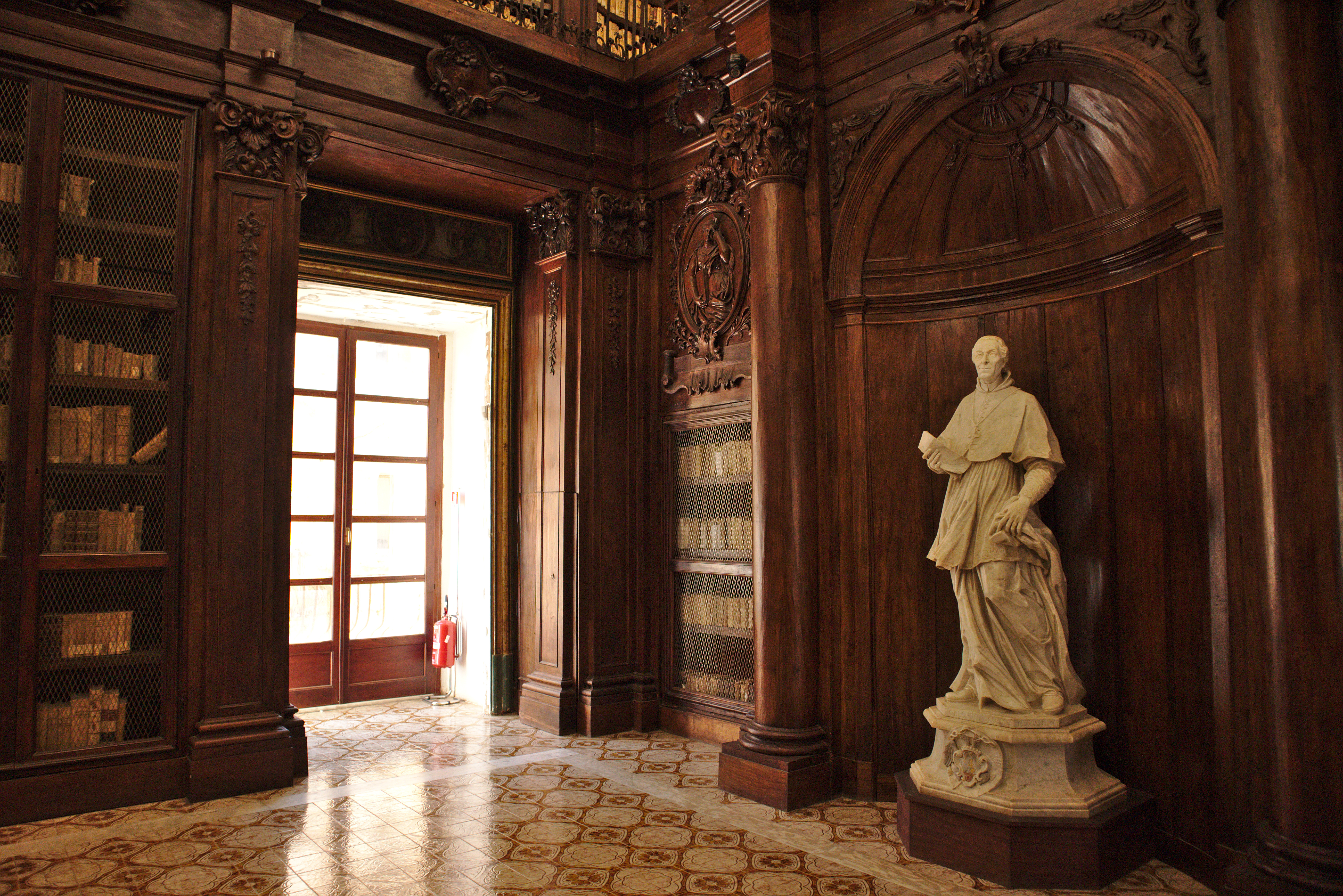 Interni della Biblioteca Lucchesiana di Agrigento.